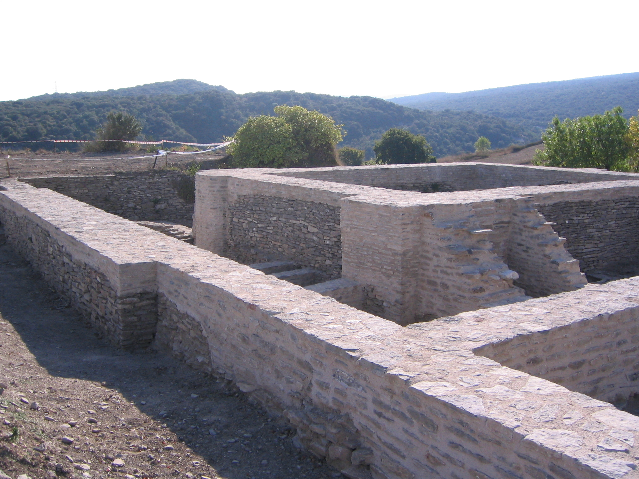 Iruña Veleia edificio tardo imperial. Álava País Vasco (España)